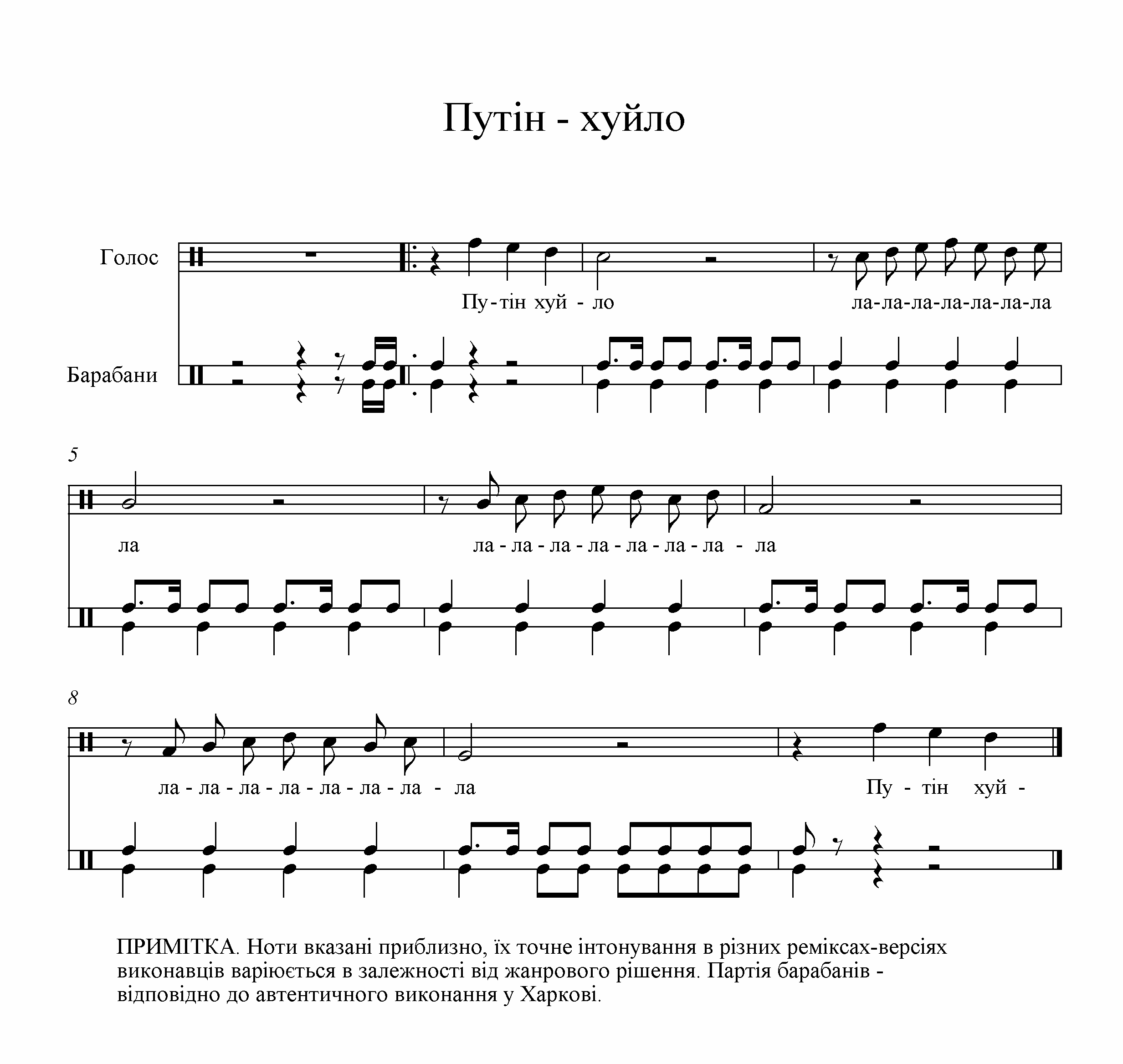 Приблизний нотний запис кричалки "Путін - Хуйло"